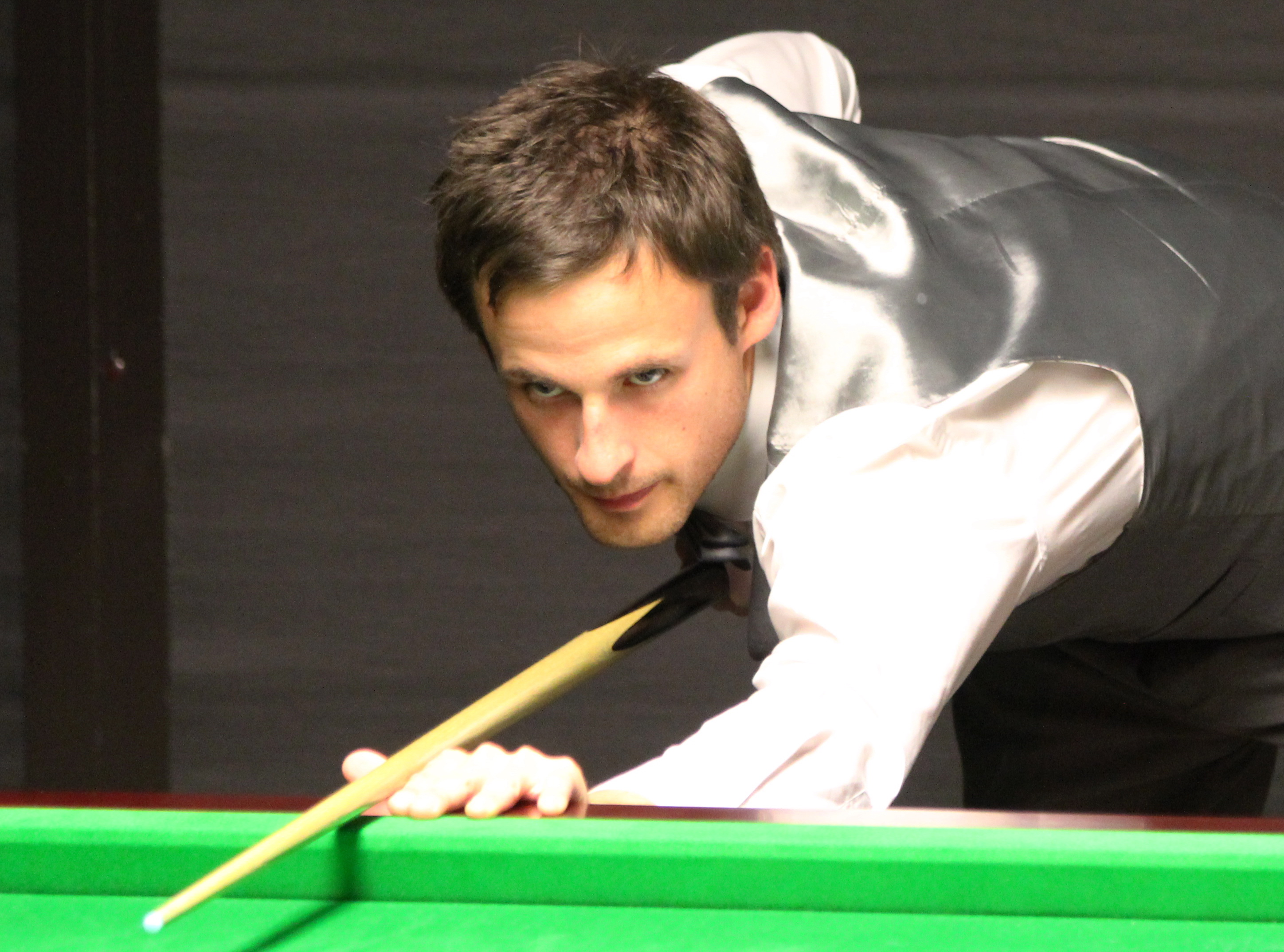 David Gilbert beim Paul Hunter Classic 2012